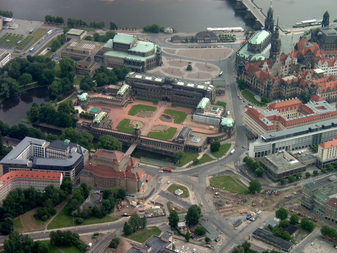 Luftbild des Dresdner Zwingers und des Postplatzes